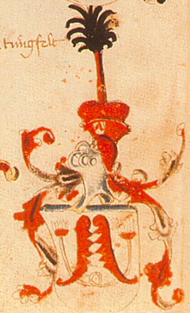 Wappen der Familie von Thüngfeld.